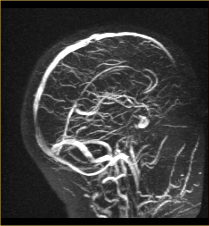 Sinusvenendarstellung im MRT